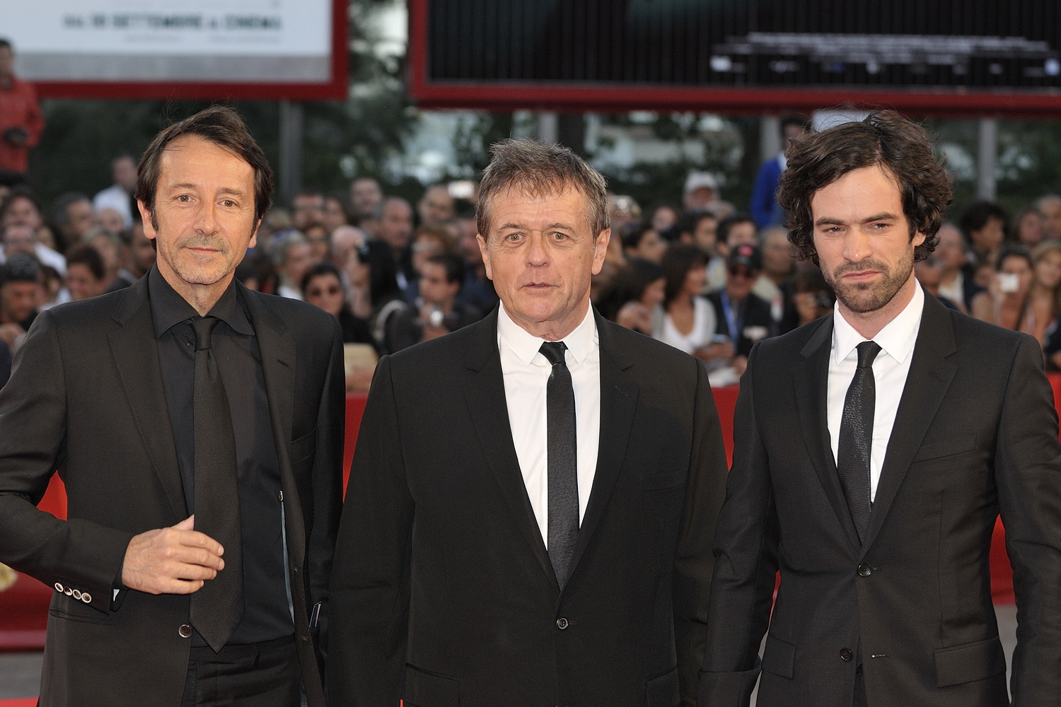 66ème Festival du Cinéma de Venise (Mostra), 4ème jour (05/09/2009) Tapis Rouge avec Romain Duris, Jean-Hugues Anglade, Patrice Chéreau (réalisateur) pour le film : Persécution